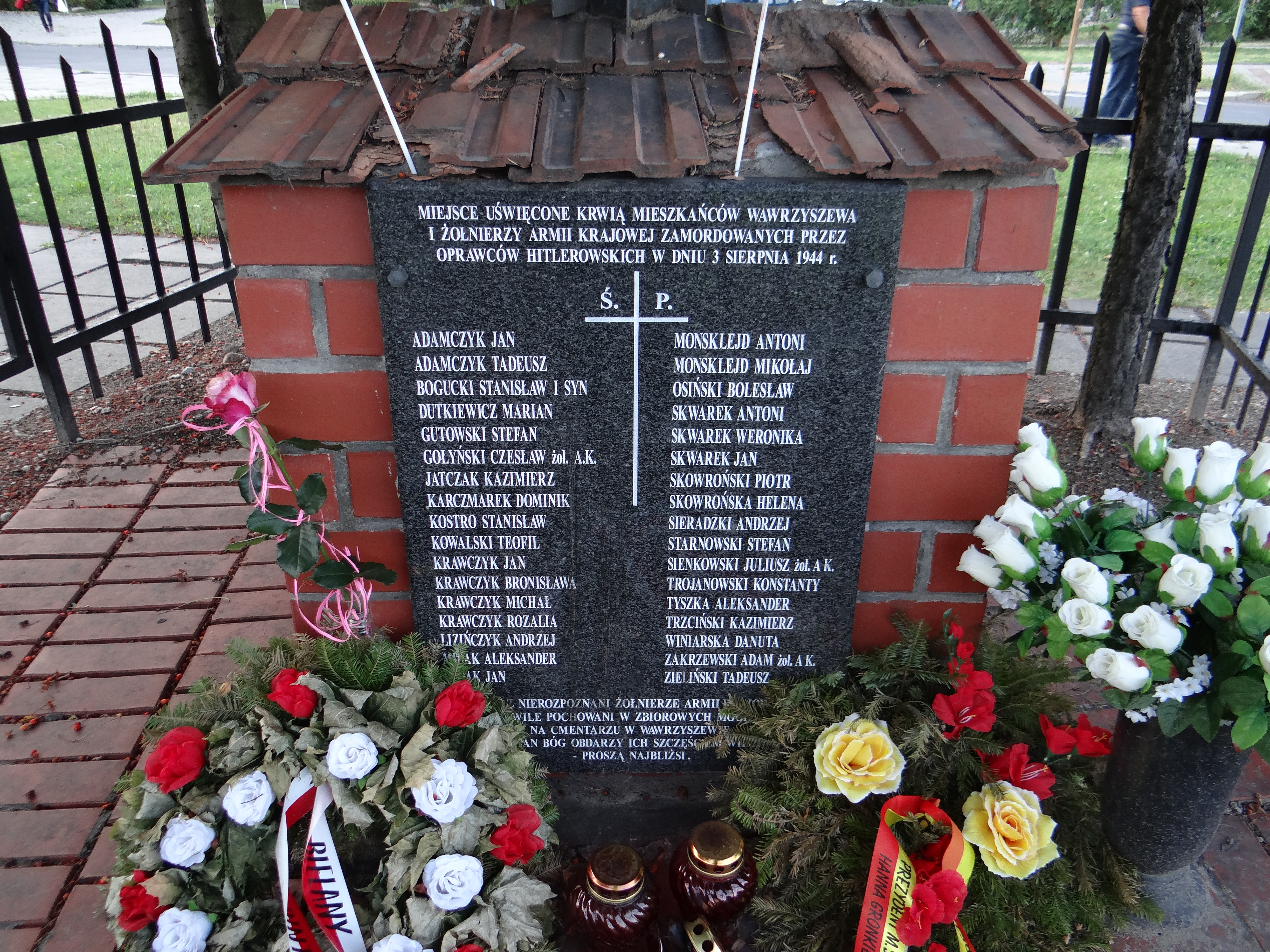 Miejsce Pamięci uświęcone krwią mieszkańców Wawrzyszewa i żołnierzy Armii Krajowej zamordowanych przez hitlerowskich oprawców 3 sierpnia 1944 roku